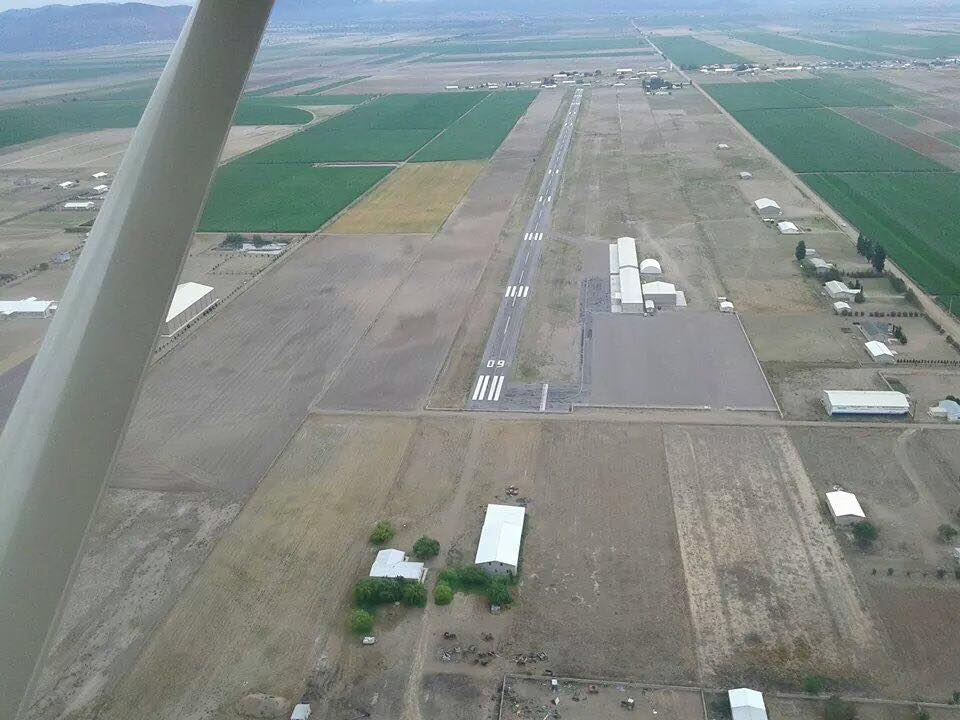 Vista aerea del Aeroclub Manitoba